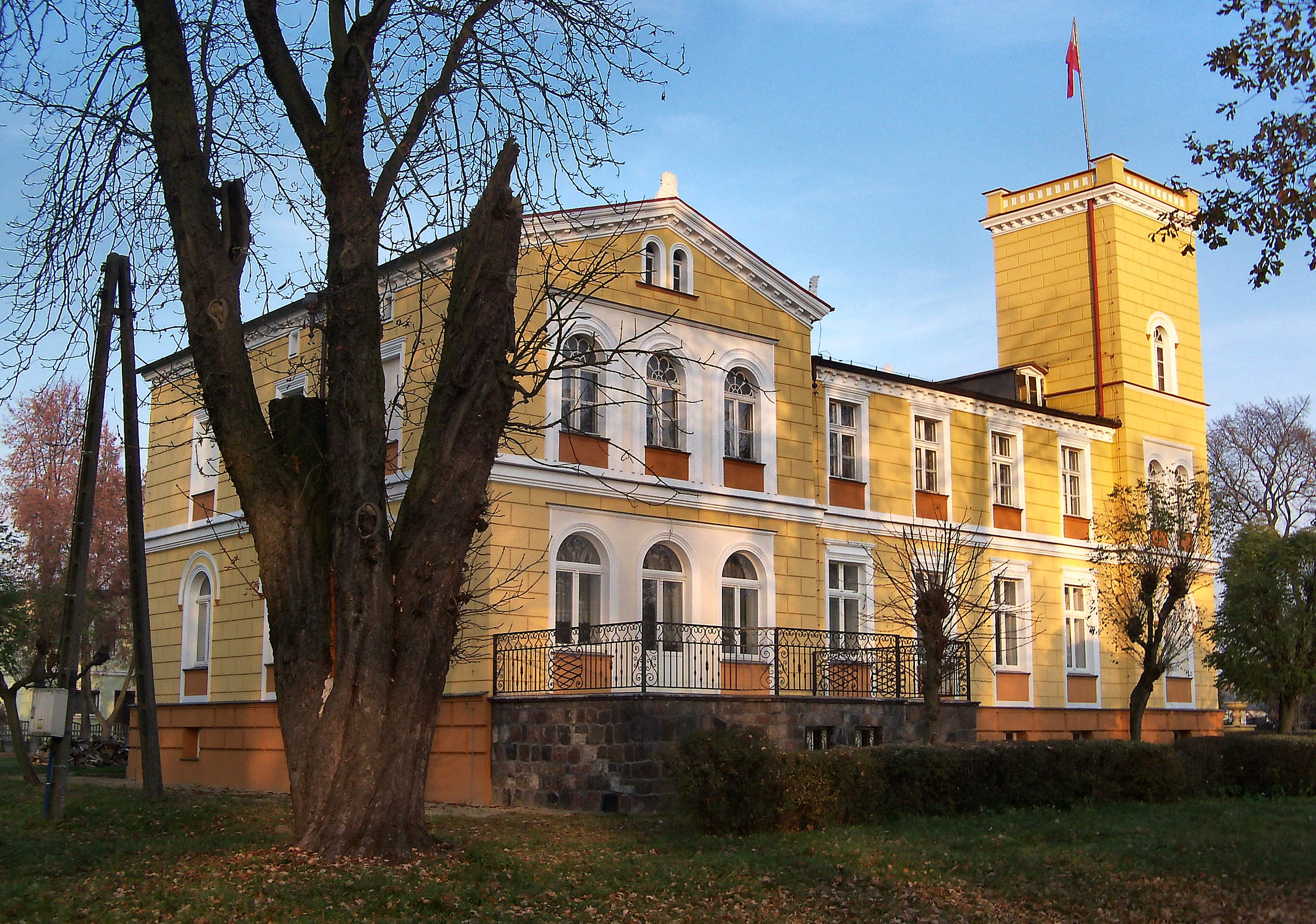 Dębowa Łęka, pałac, XIX